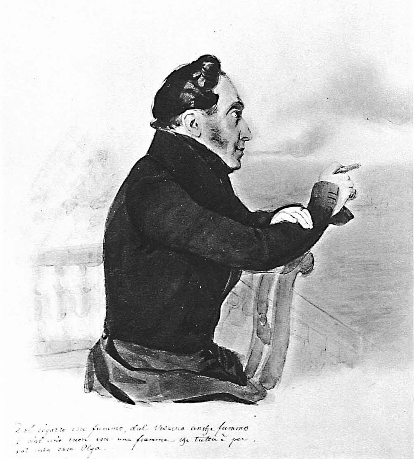 Александр Яковлевич Булгаков (1781-1863)